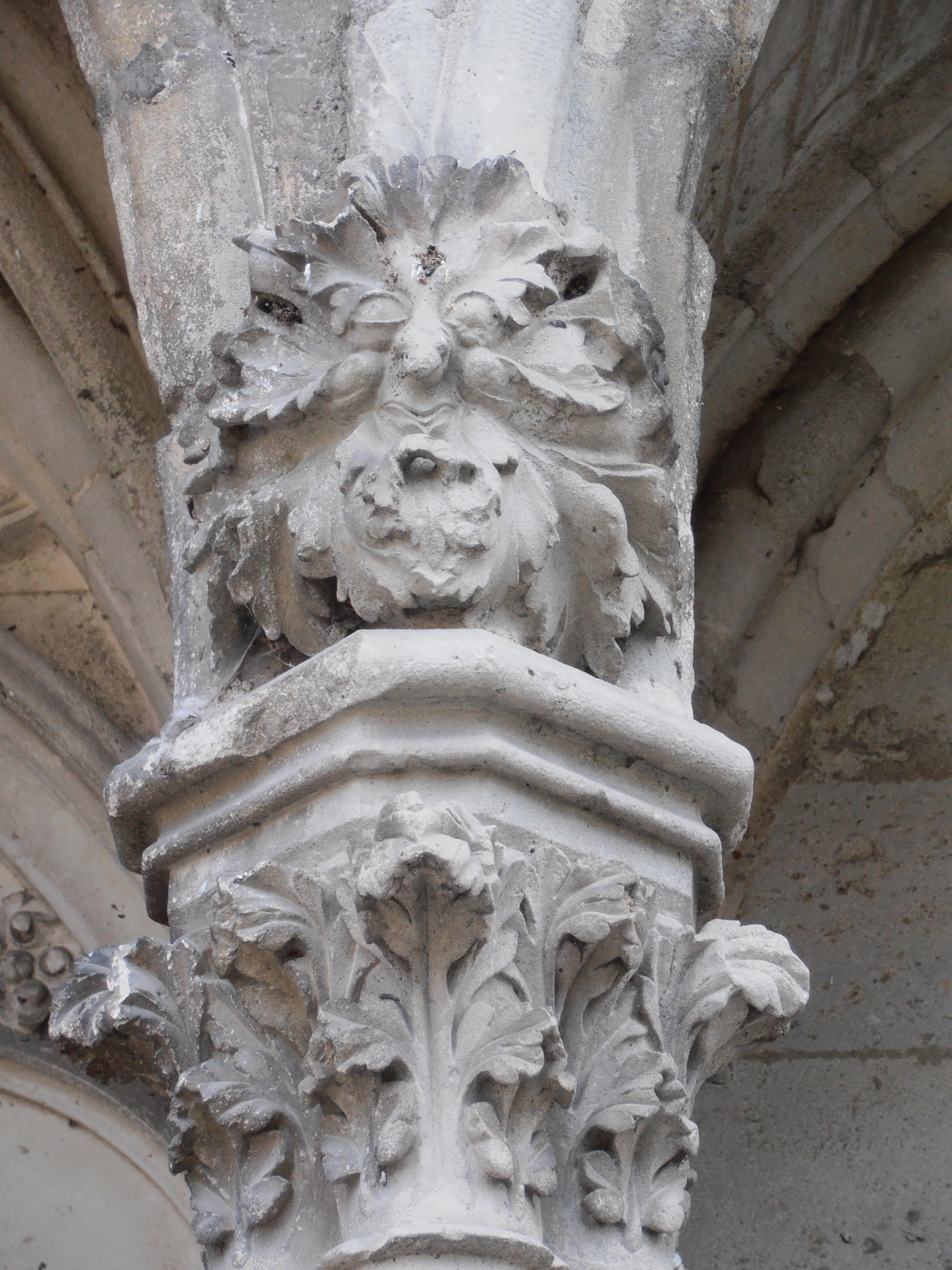 Il s'agit d'une tête de chapiteau en forme de feuillage du portail nord de Saint julien du sault du 13e siècle.